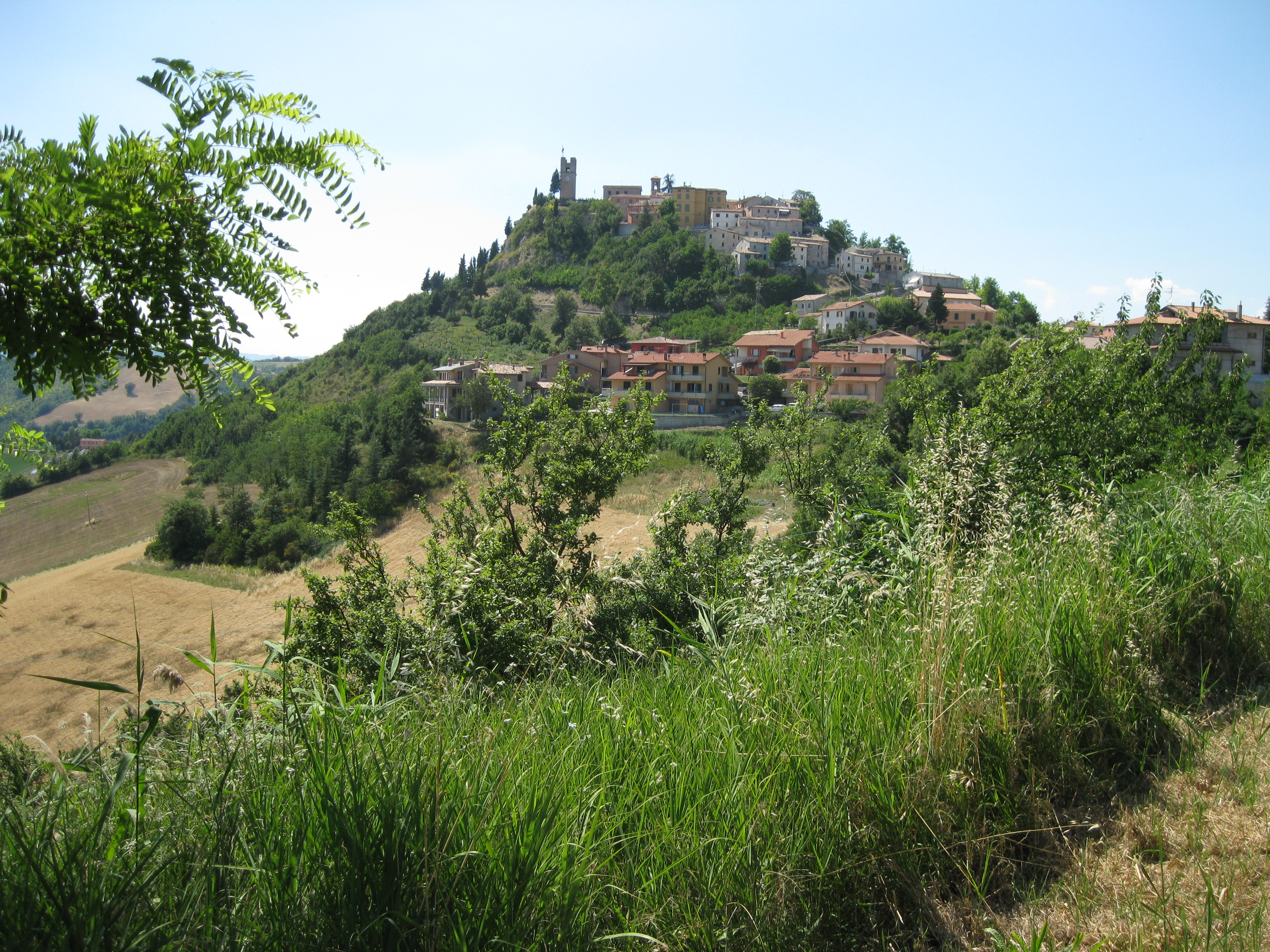 Peglio, Italien